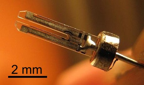 Stimmgabelquarz